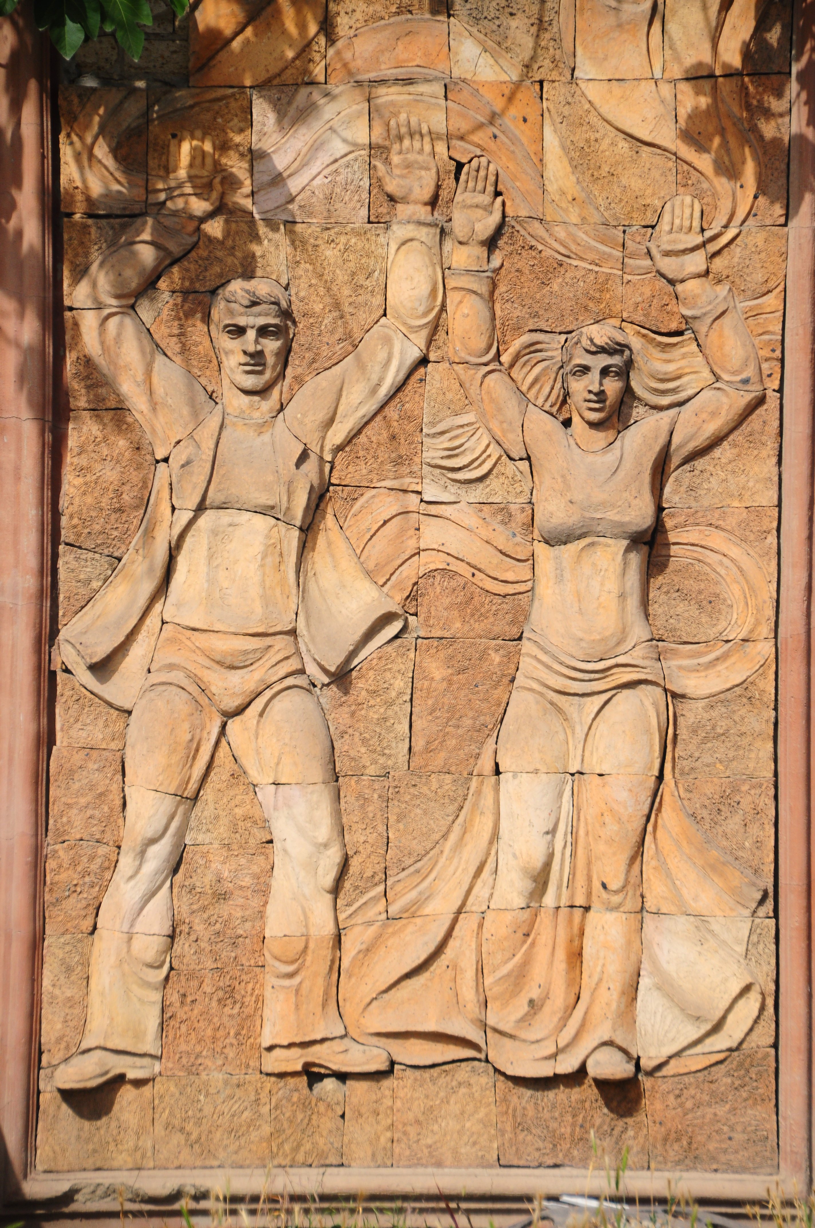 17661 Rustavi